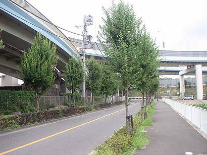 稲城IC